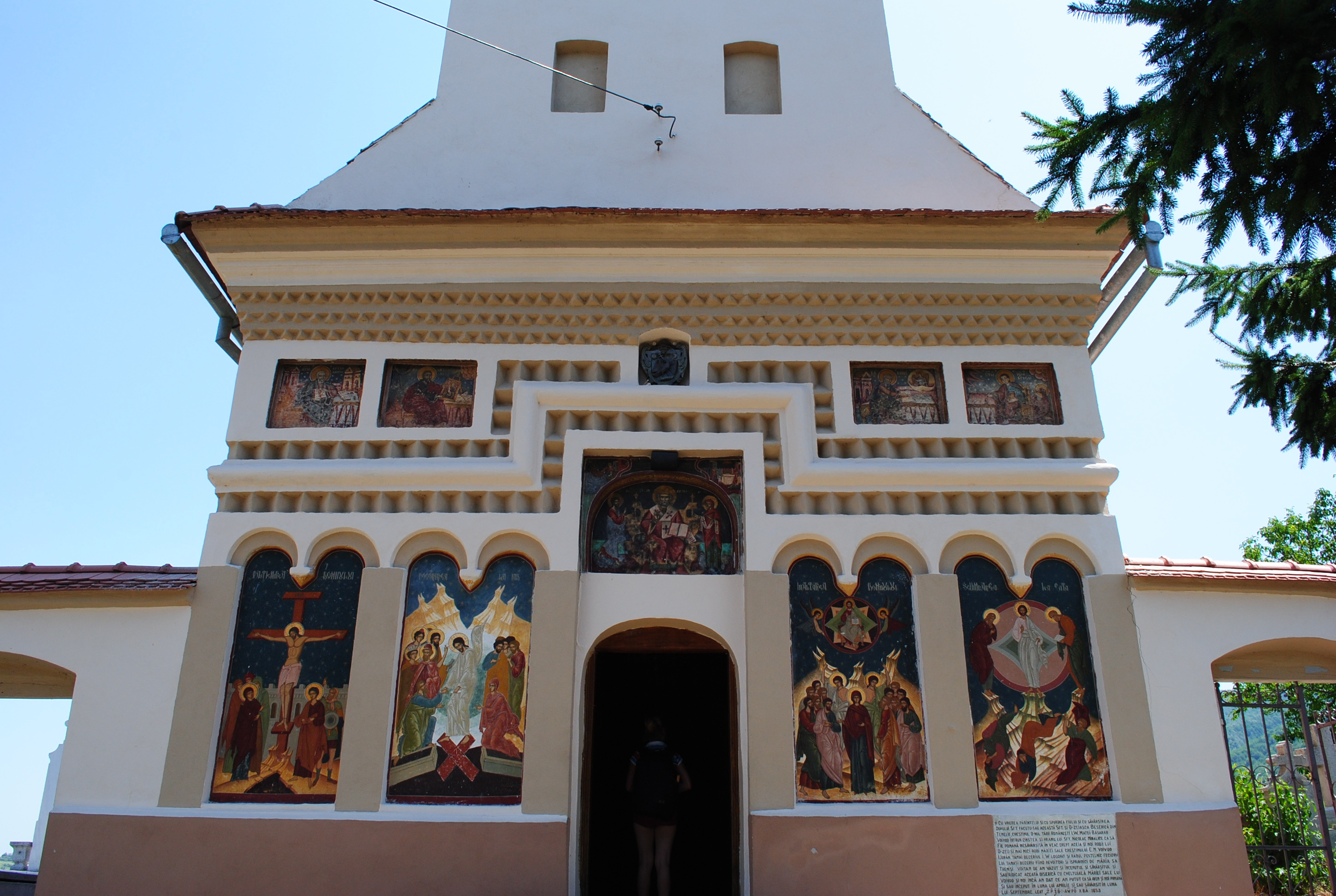 Biserica "Sf. Nicolae"-Porcești, 1653,1827 - 1828; refaceri sec. XX